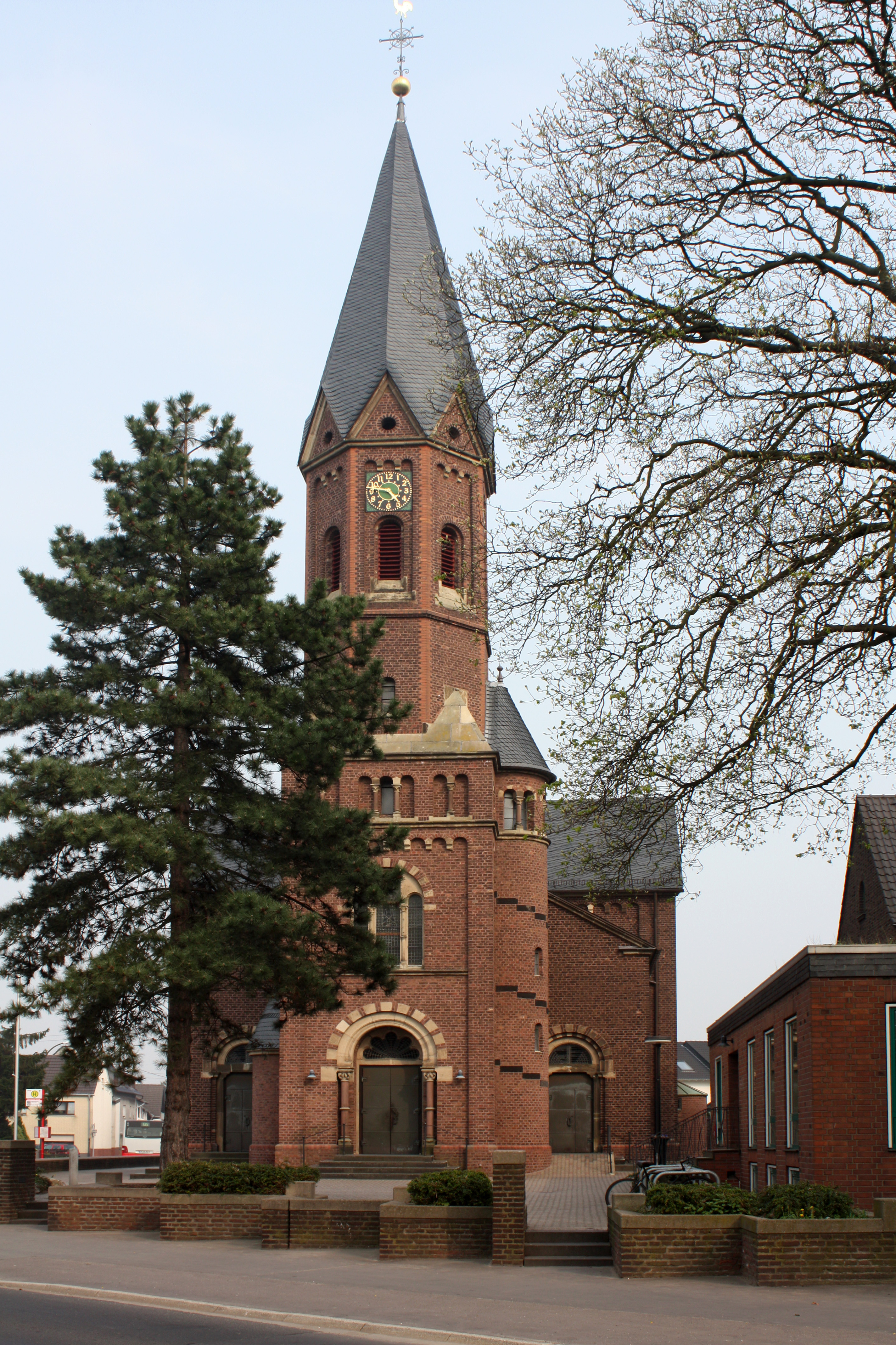 Köln-Meschenich, Brühler Landstr. 425. Pfarrkirche St. Blasius This is the photograph of an architectural monument. It is part of the list of cultural monuments of Köln, no. 1102